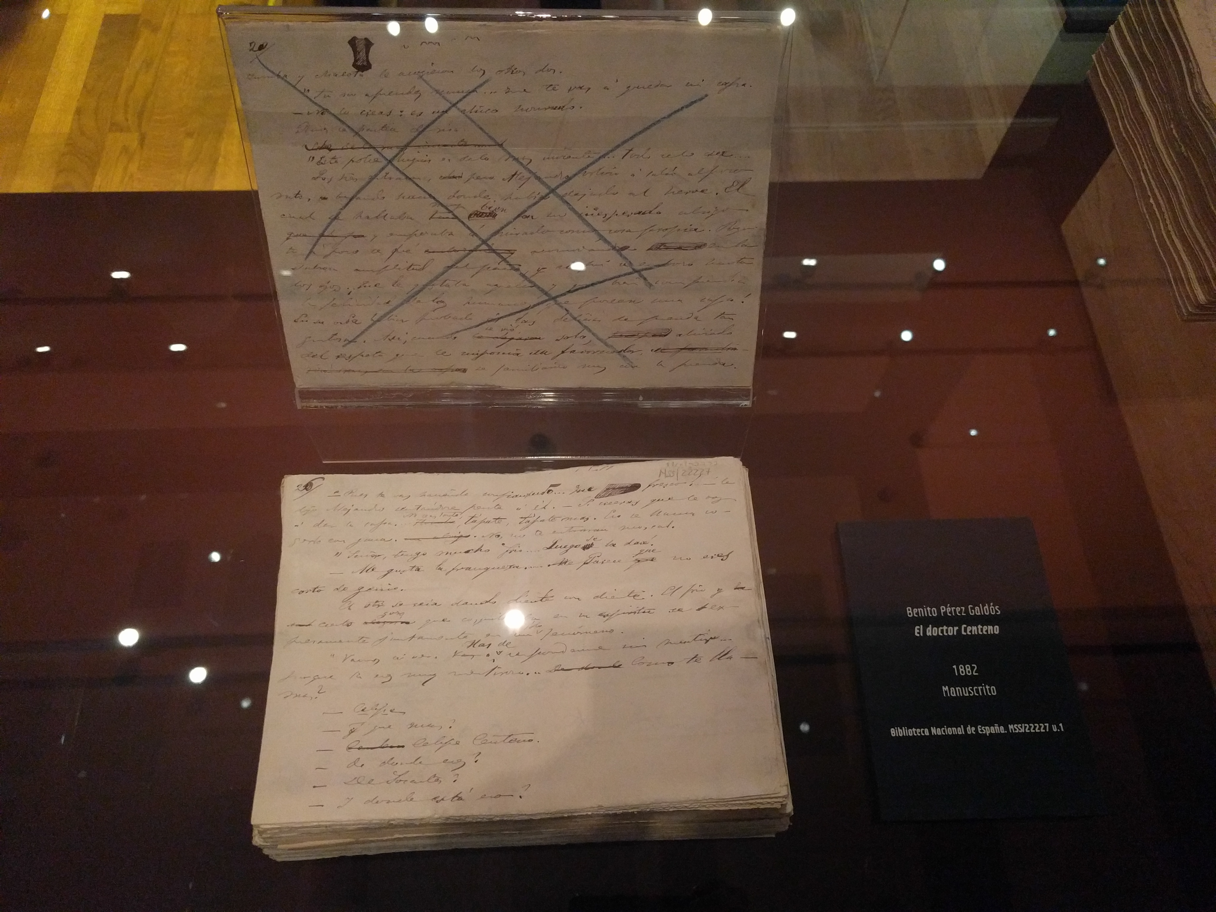 Manuscrito de El doctor Centeno de Benito Pérez Galdós, 1881. Biblioteca Nacional de España.